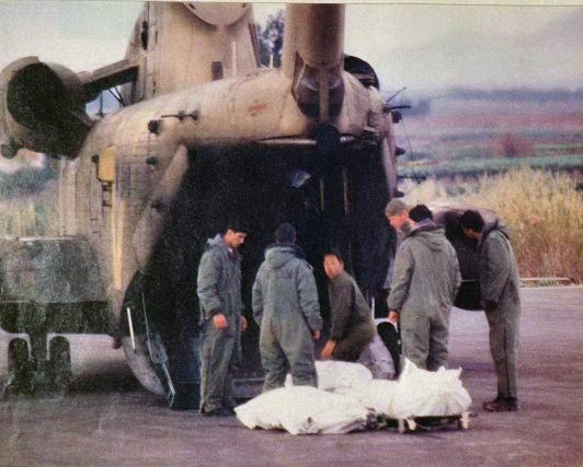 גופות חללי אסון המסוקים